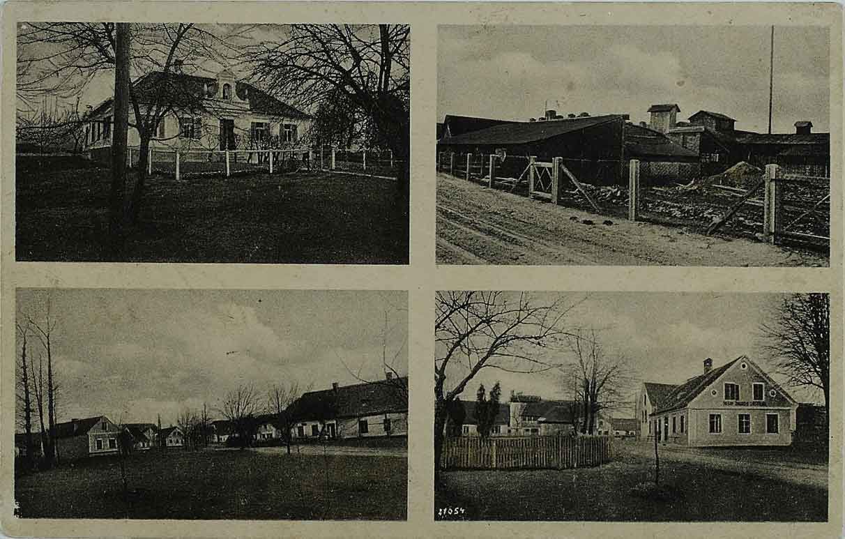 Razglednica Ložnice pri Žalcu.